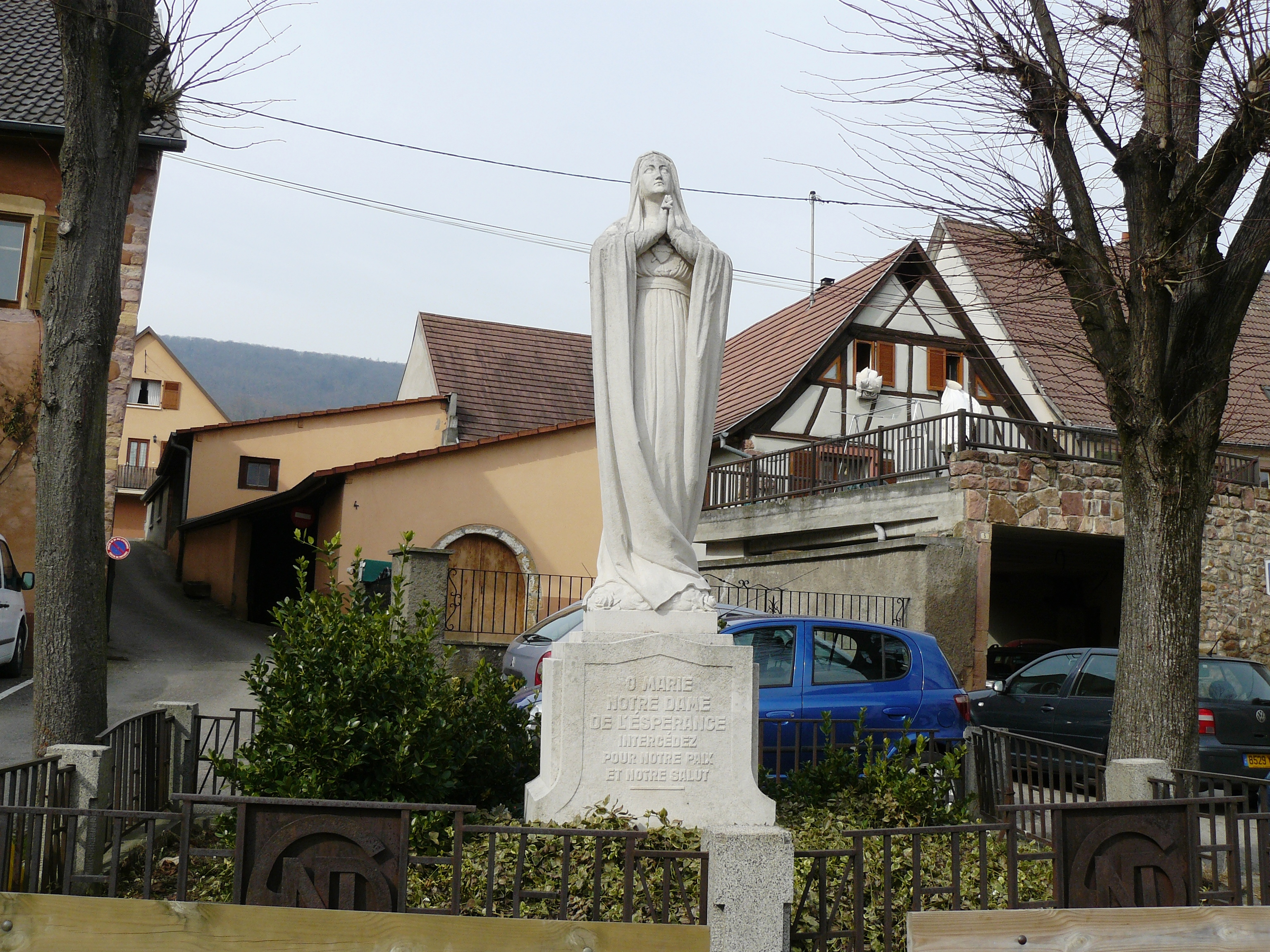 Statue de Notre Dame de l'Espérance - Pfaffenheim (Haut-Rhin)